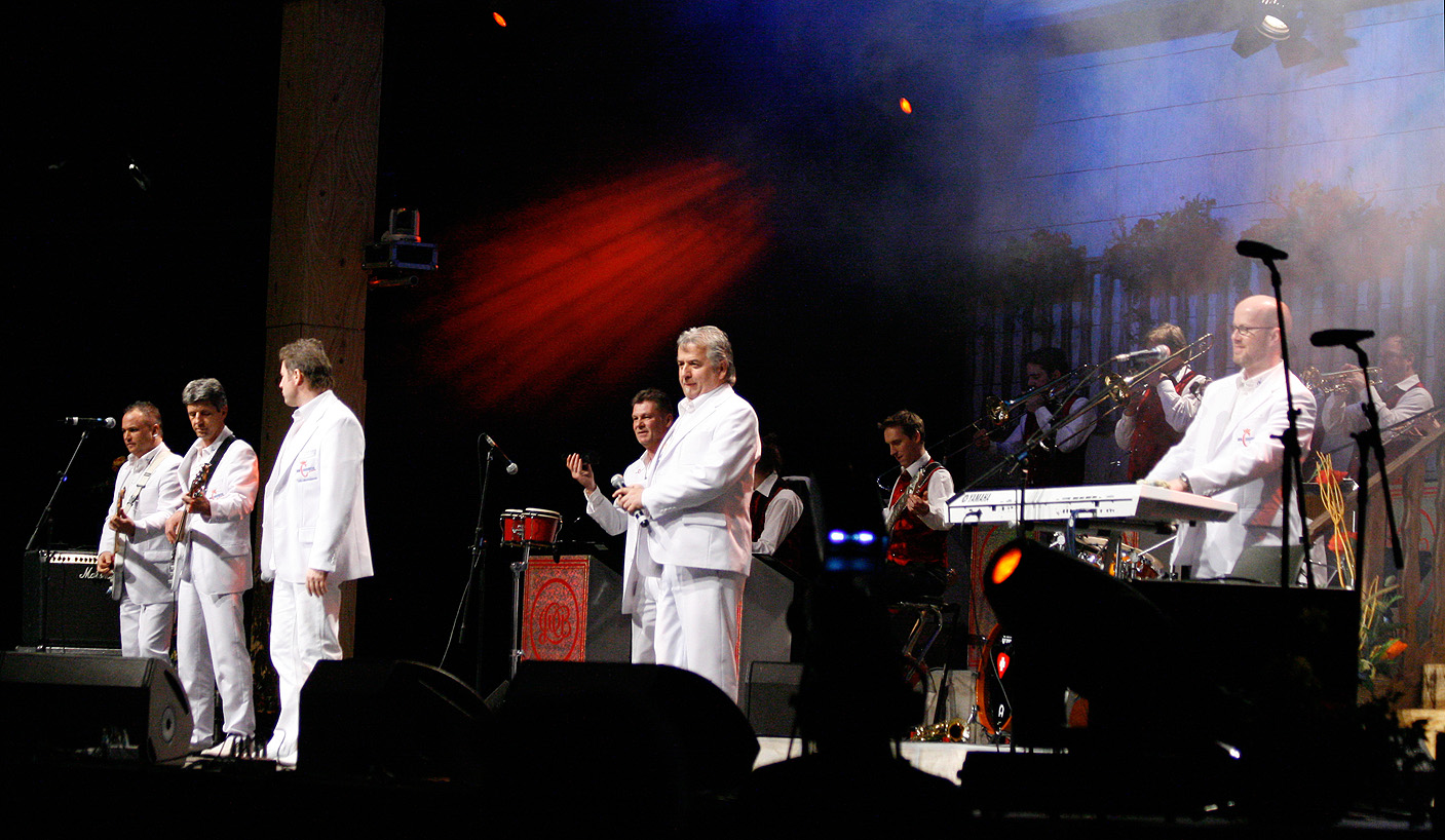 Das Nockalm Quintett mit der Musikantenstadl-Tournee in der Wiener Stadthalle.